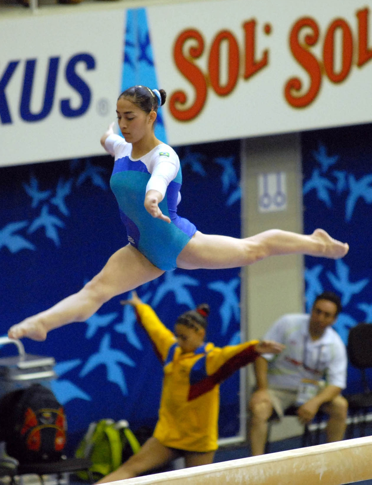 Rio de Janeiro - Daniele Hypólito, quinta colocada na ginástica artística individual.